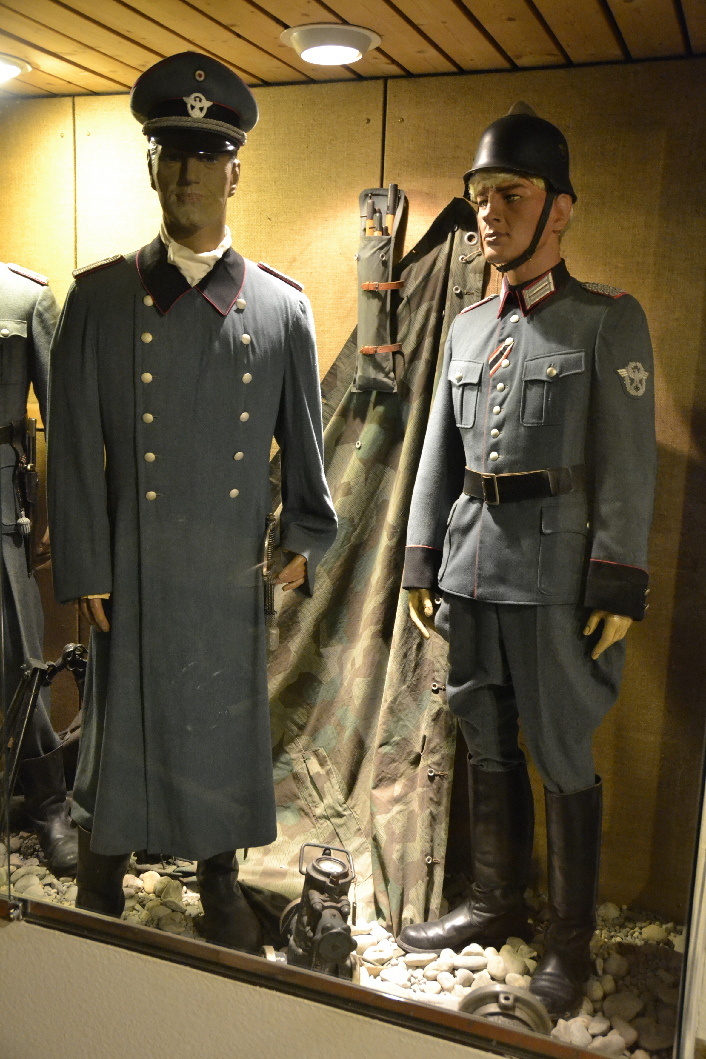 Ausstellungsstücke des Feuerwehrmuseums München.